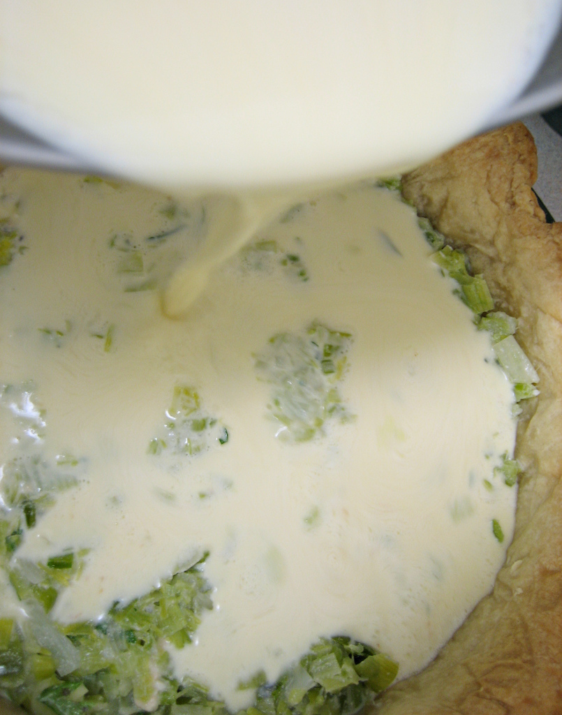 Pouring the quiche custard into the prebaked pâte brisée crust. Re: Quiche au Roquefort et aux Poireaux from Thomas Keller's book "Bouchon" (ISBN 1-57965-239-5, p. 91).